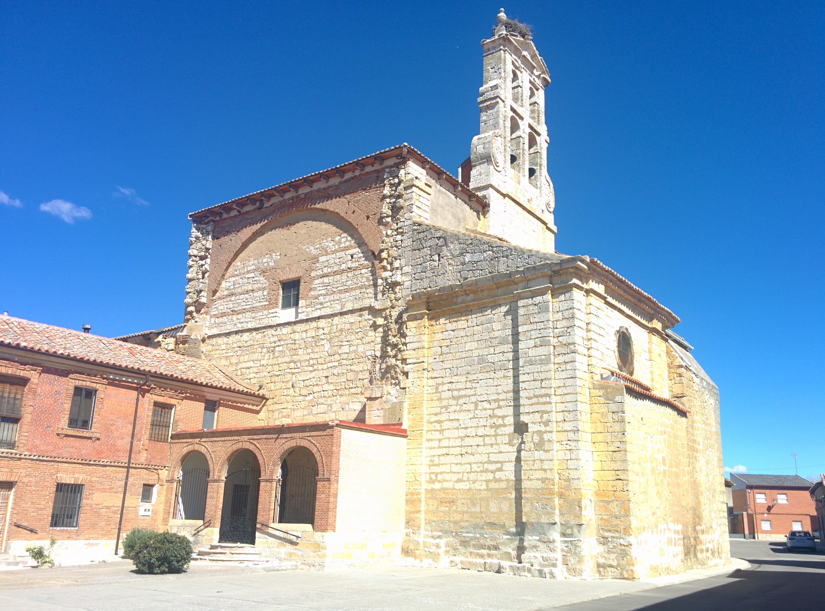 Iglesia de San Martín, en Gallegos de Hornija (Valladolid, España).